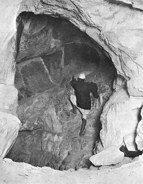 herses de granite dans la pyramide de Khéops